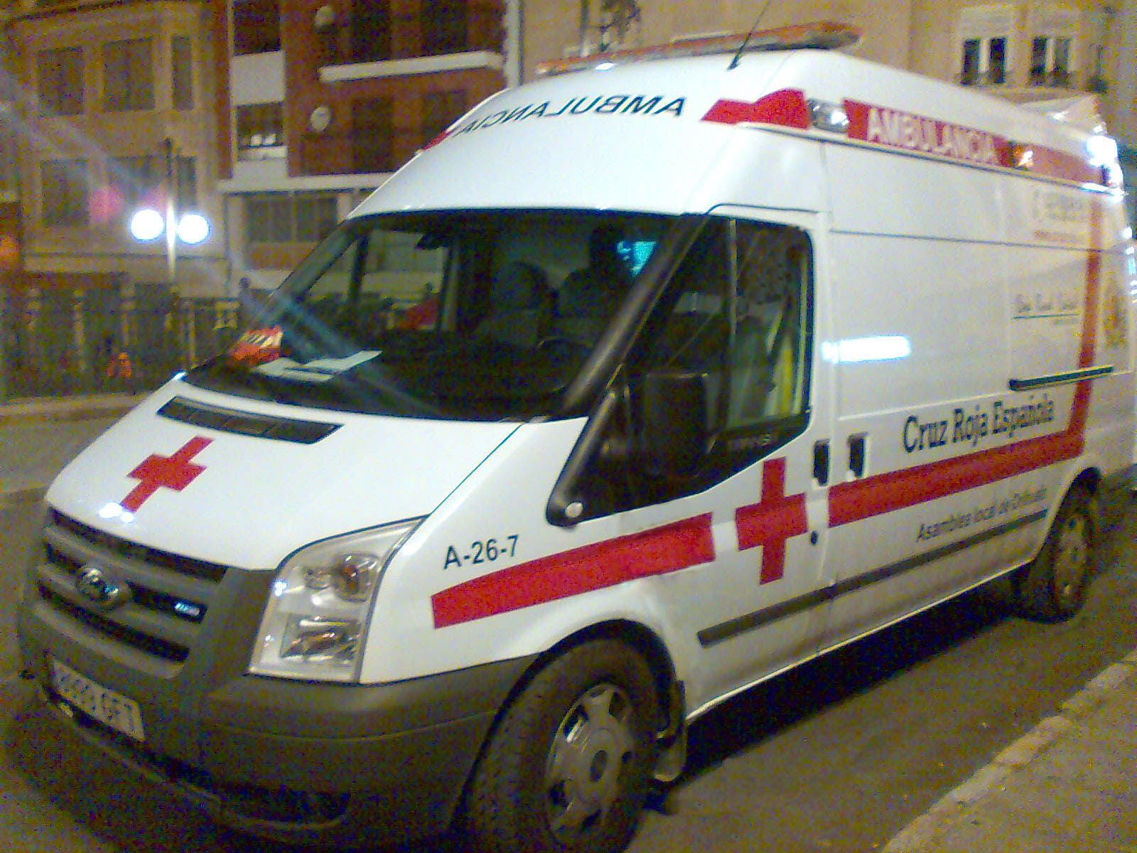 Ambulancia de la Cruz Roja Española de Orihuela.